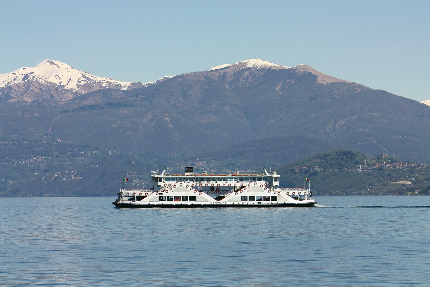 Traghetto M/N Sempione naviguant sur le lac Majeur en 2014, devant le Monte Tamaro et le Monte Lema